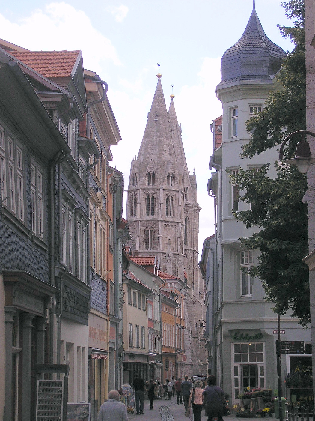 Eine Altstadtgasse (Linsenstrasse) in Mühlhausen (Thüringen).